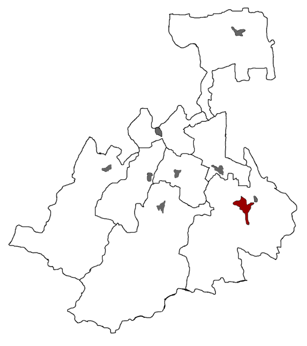 Расположение города Владикавказ на карте Северной Осетии. Ирон: os:Дзæуджыхъæу.